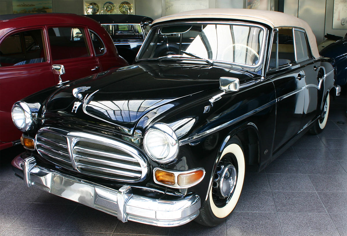 IFA Sachsenring P 240 Cabriolet (1956 - 1959) im EFA-Museum für Deutsche Automobilgeschichte